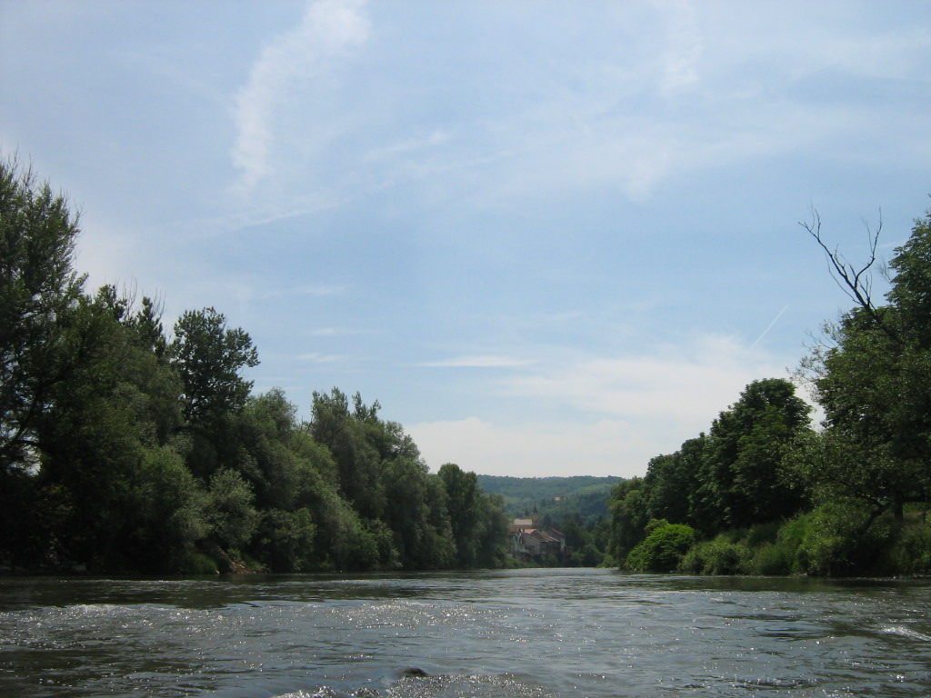 River Bosna in Visoko.